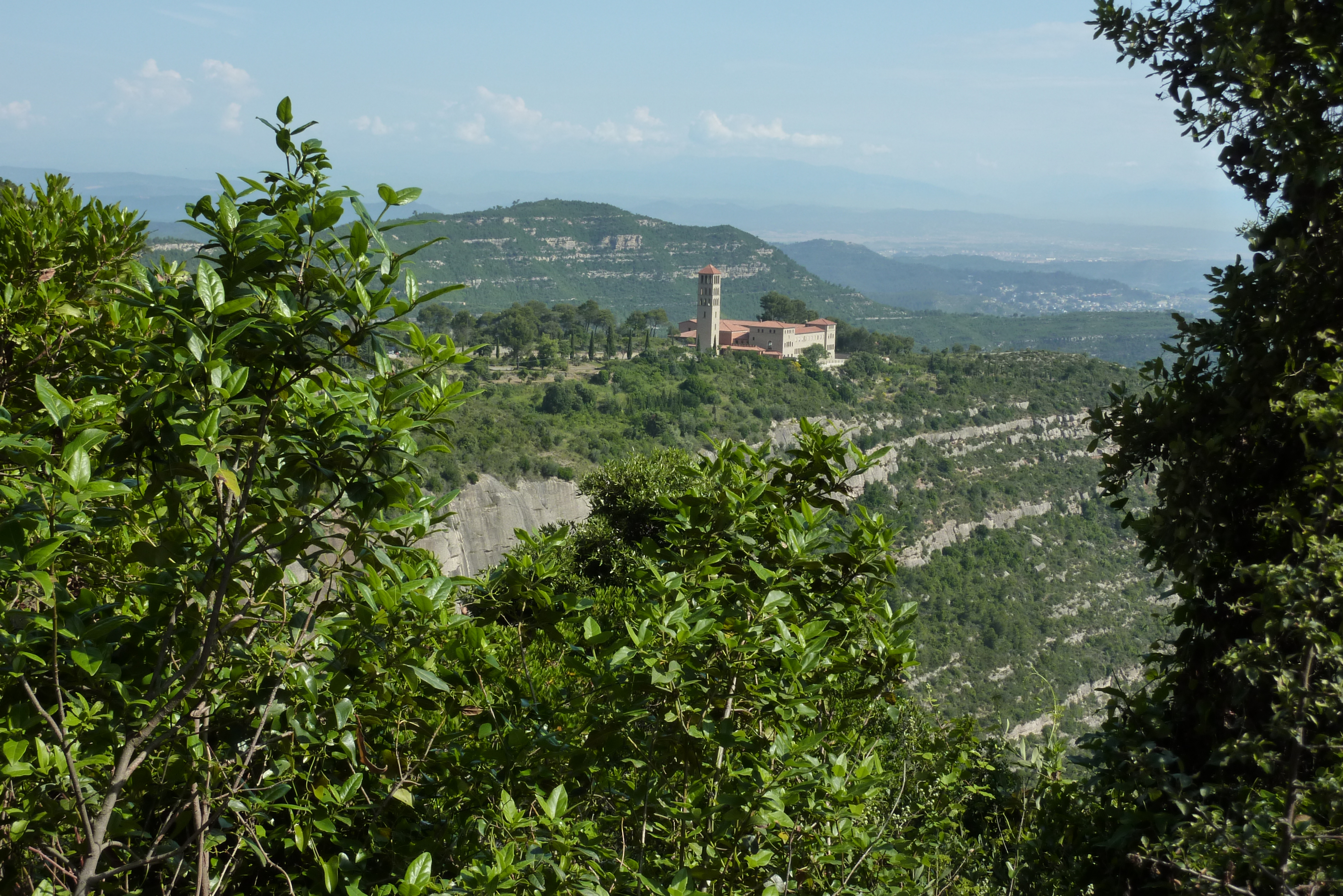 Kloster San Benet auf dem Montserrat (Berg)